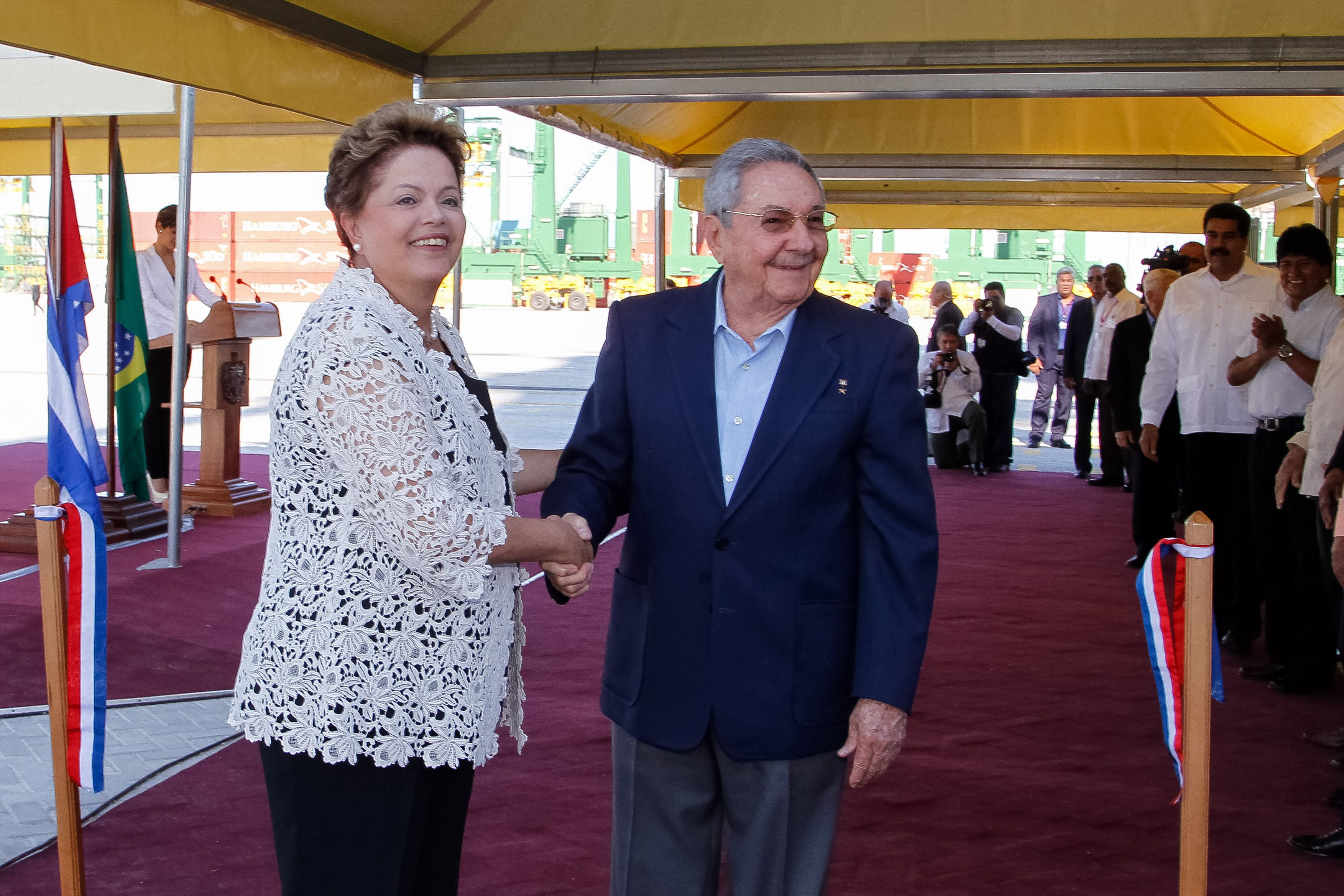 Província de Artemisa (Cuba) - Presidenta Dilma Rousseff e o presidente de Cuba, Raúl Castro, durante inauguração do Porto de Mariel (Roberto Stuckert Filho/Presidência da República)